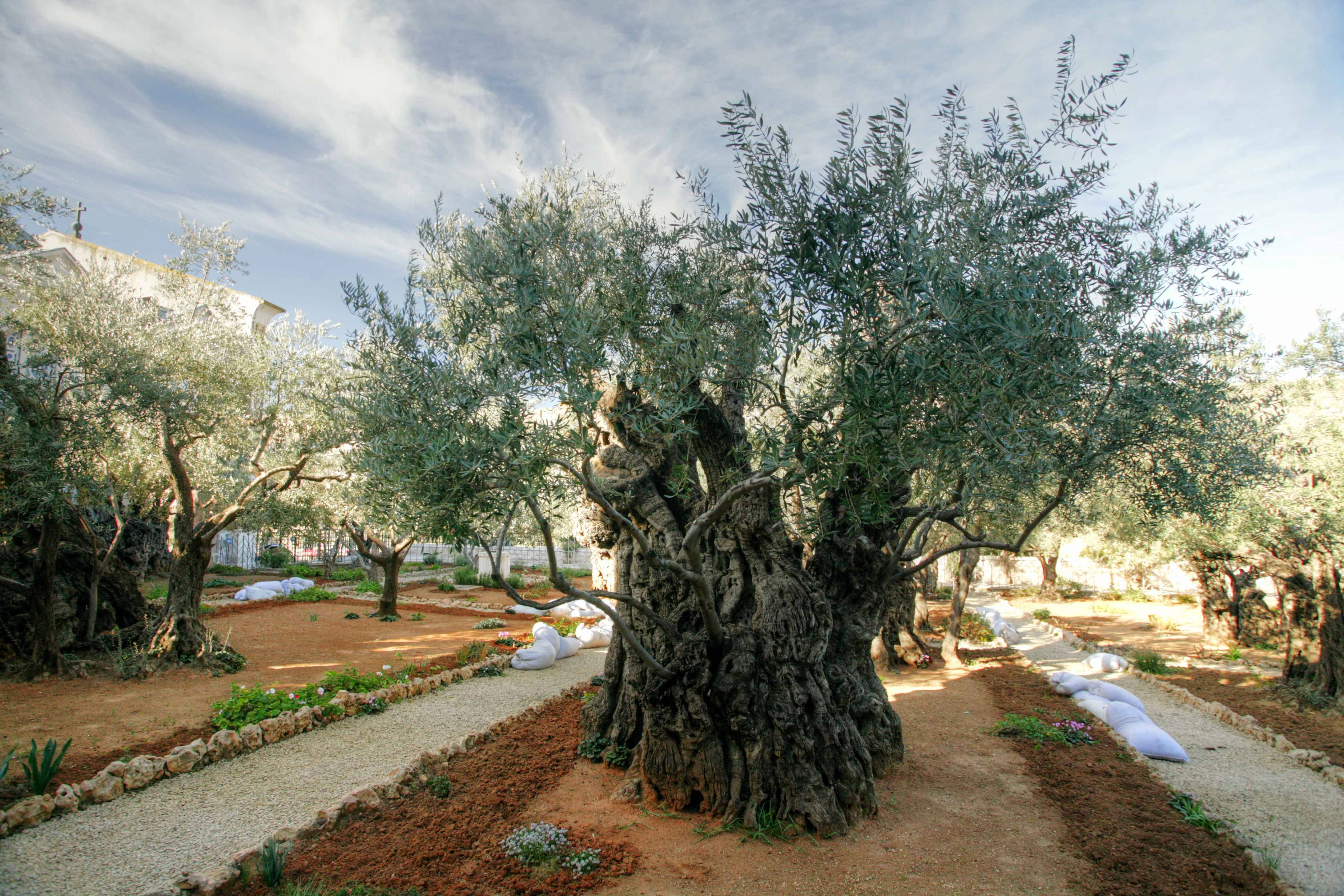 Jerusalem